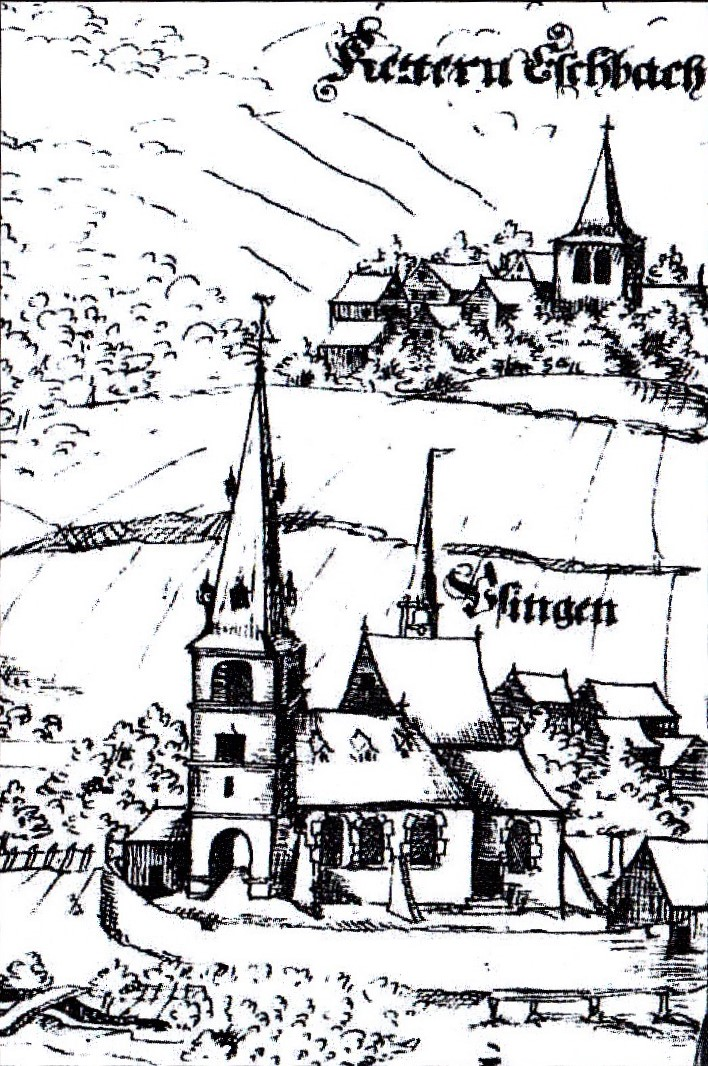 Historische Zeichnung von 1590: Usinger Kirche und Stadt sowie Kettern-Eschbach von Süden